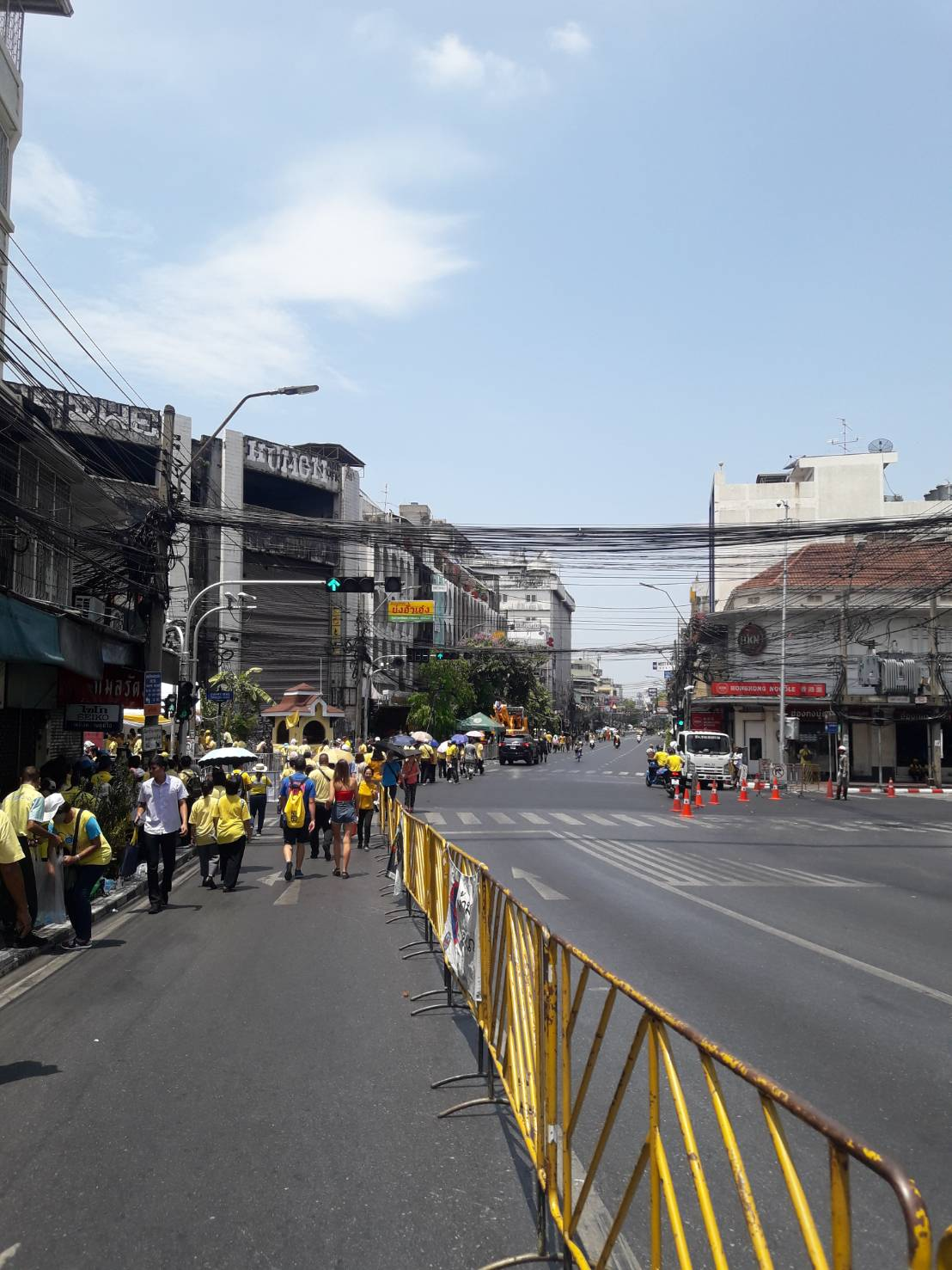 แยกบางลำภูในปี พ.ศ. 2562